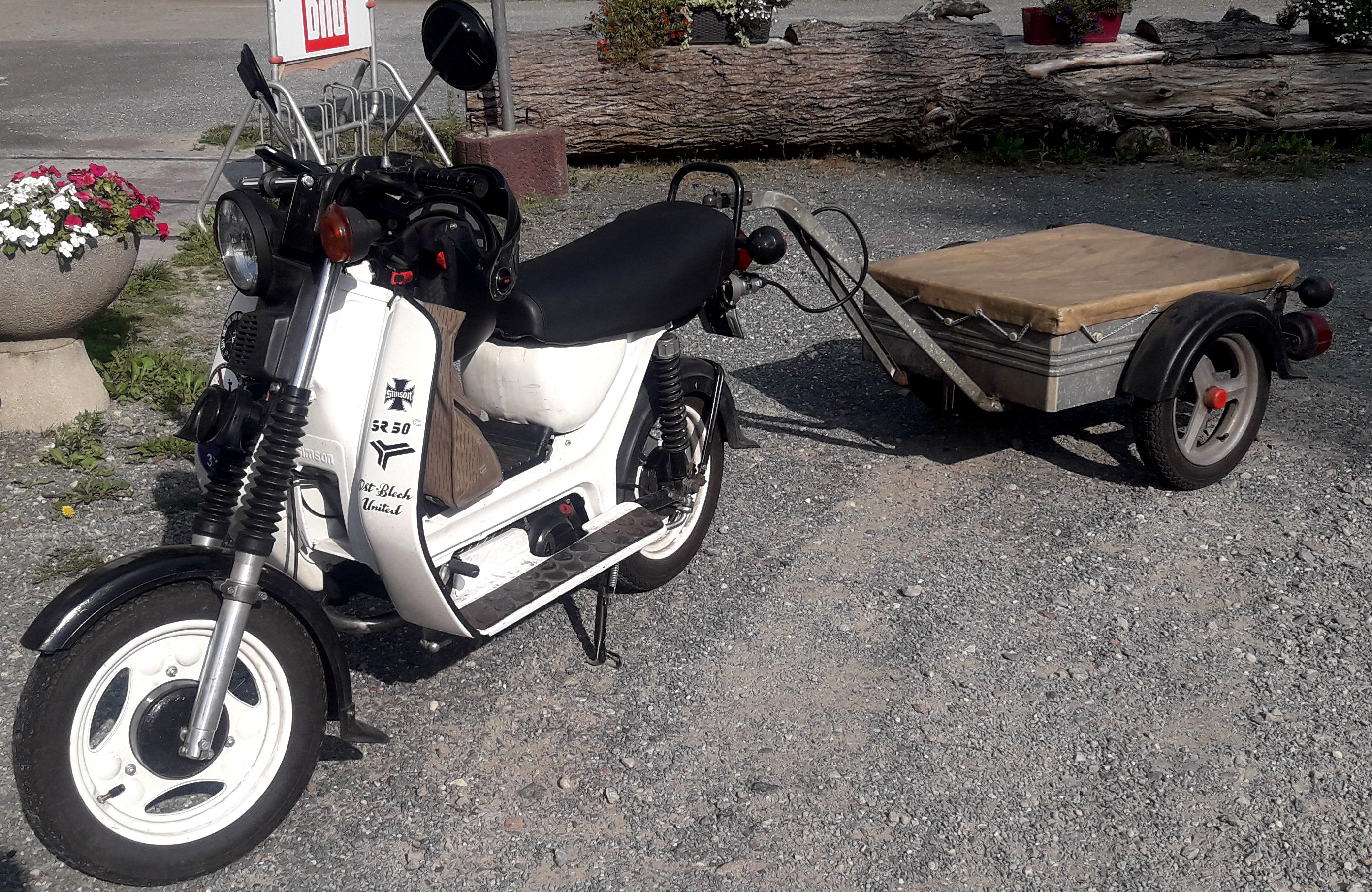 SR50 CE im unrestaurierten Originalzustand von 1987, CE = Comfort+Elektrostarter, mit originalem Anhänger "MWH/RB"